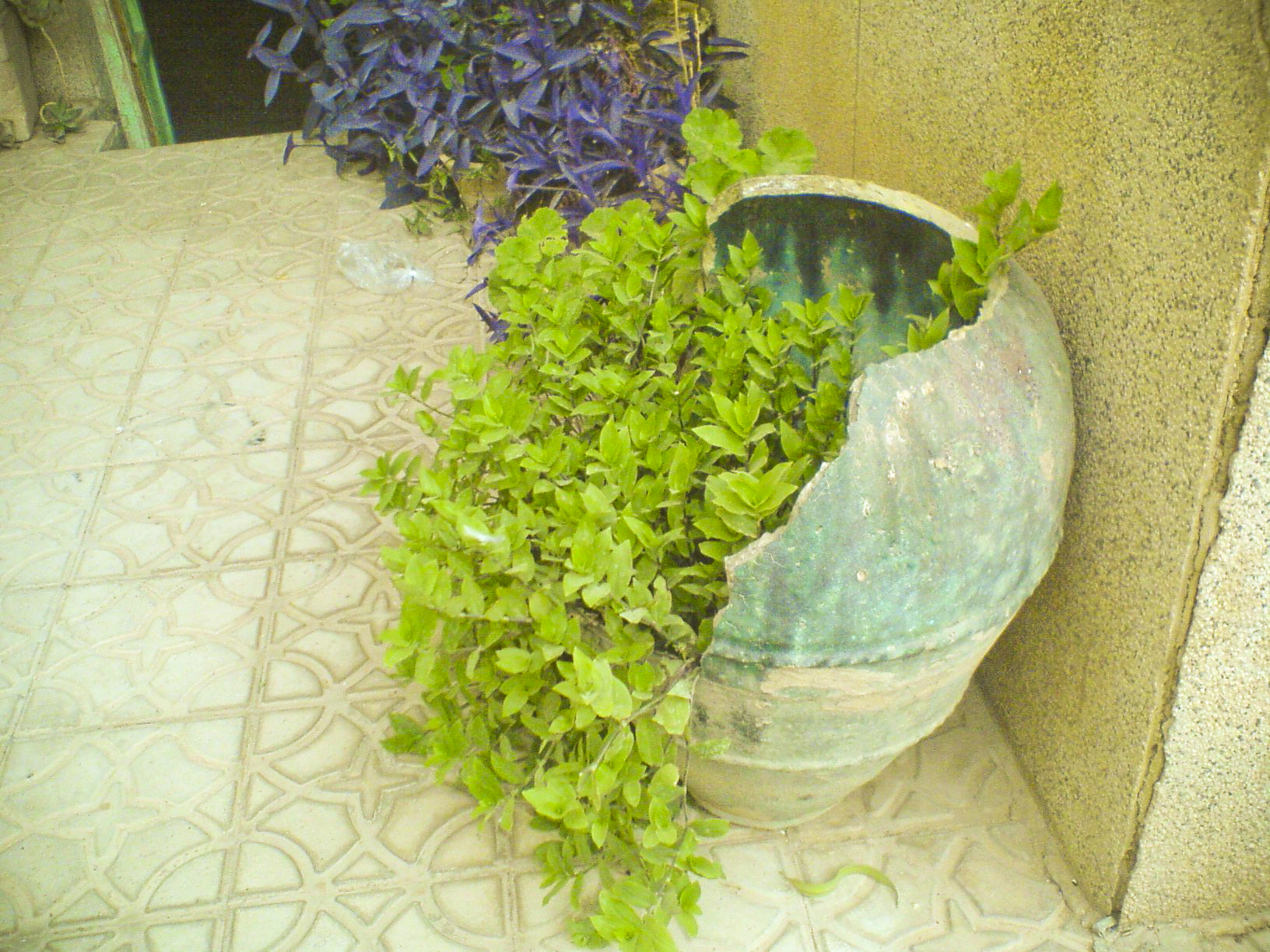 زیبایی در عین سادگی